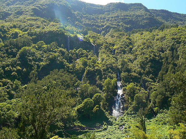 Voile de la Mariée de Salazie, La Réunion, France.